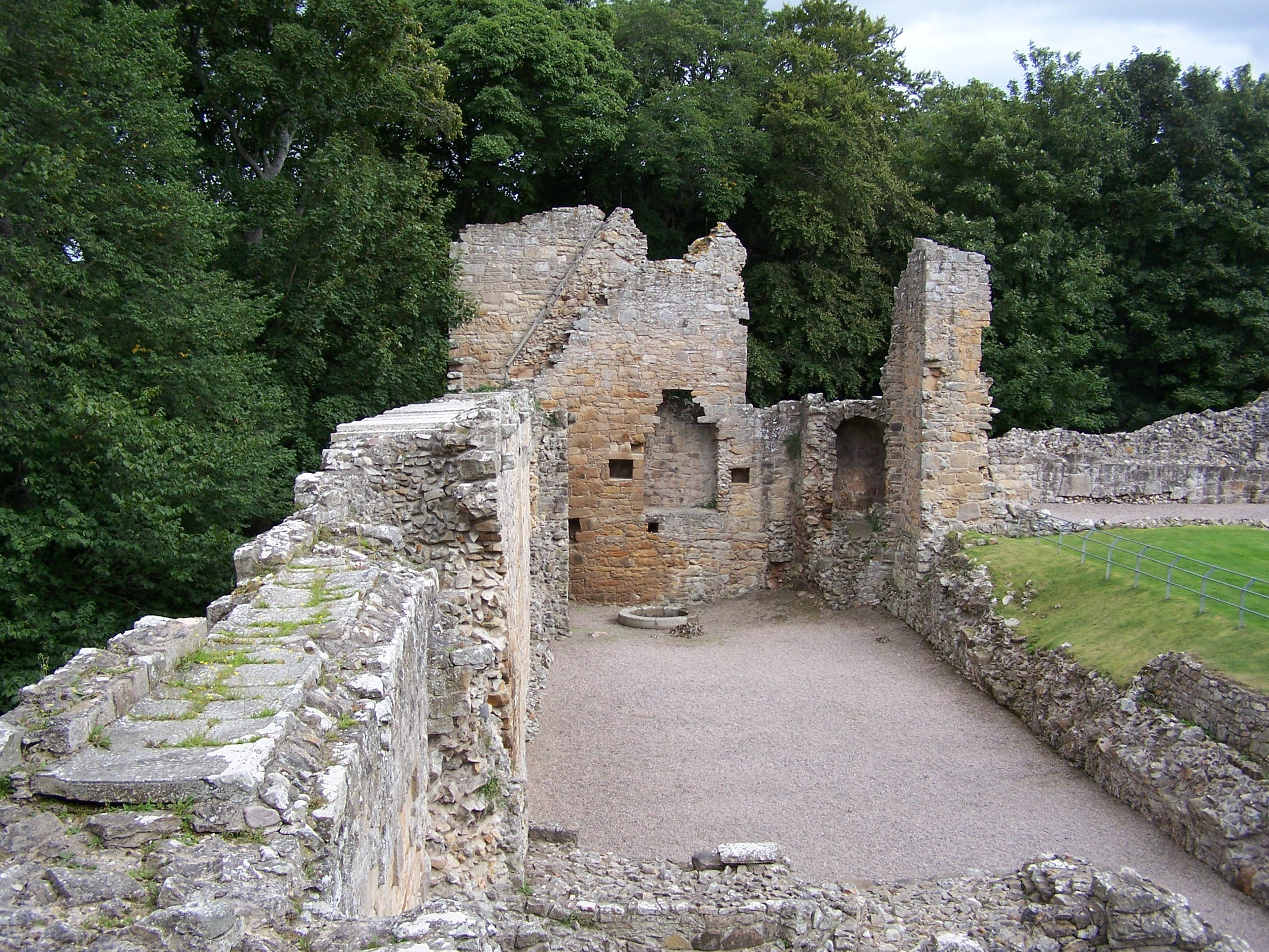 Spynie Palace